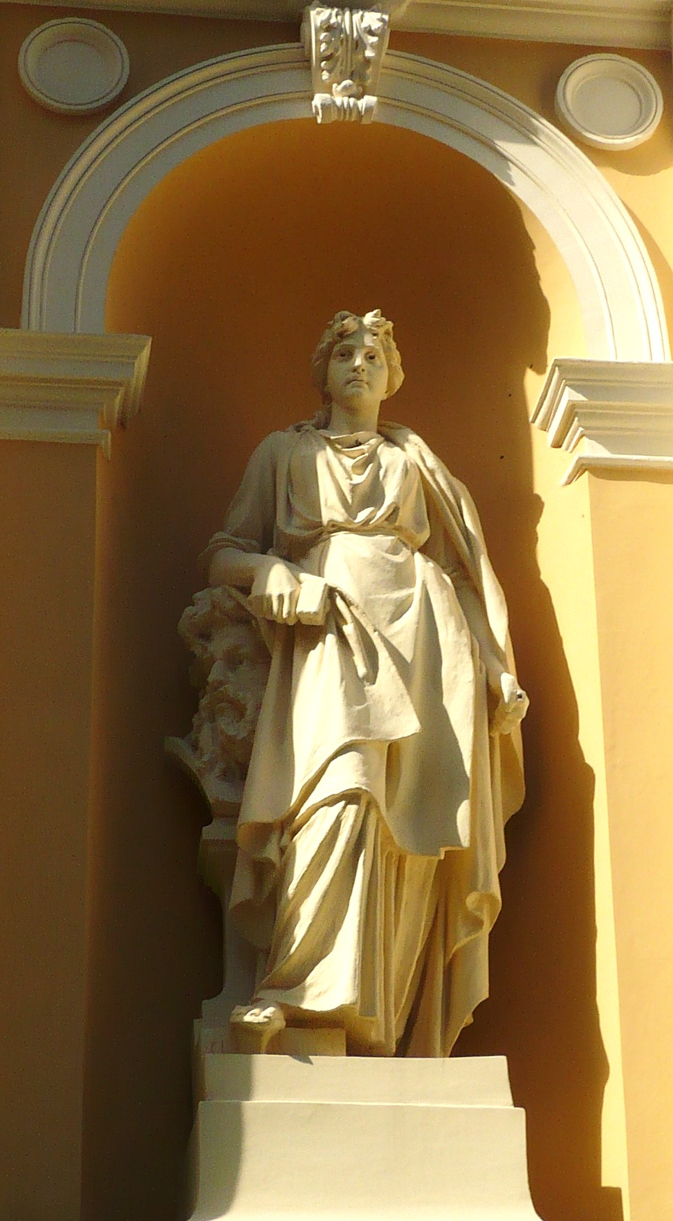 Lwów. Rzeźba na Pałacu Sztuki w Parku Stryjskim